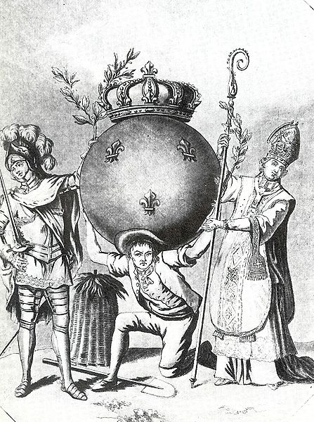 تعبير عن الطبقات الثلاث في المجتمع الفرنسي قبل الثورة الفرنسية رجال الدين والنبلاء وعامة الشعب أو اليسار حامل العبئ الرئيسي. مصرى: رسمه بتوضح طبقات المجتمع الفرنسي قبل الثوره, النبلاء و رجال الدين مرتاحين و عامه الشعب هما اللى شايلين مسؤولية كل حاجه فى البلد.